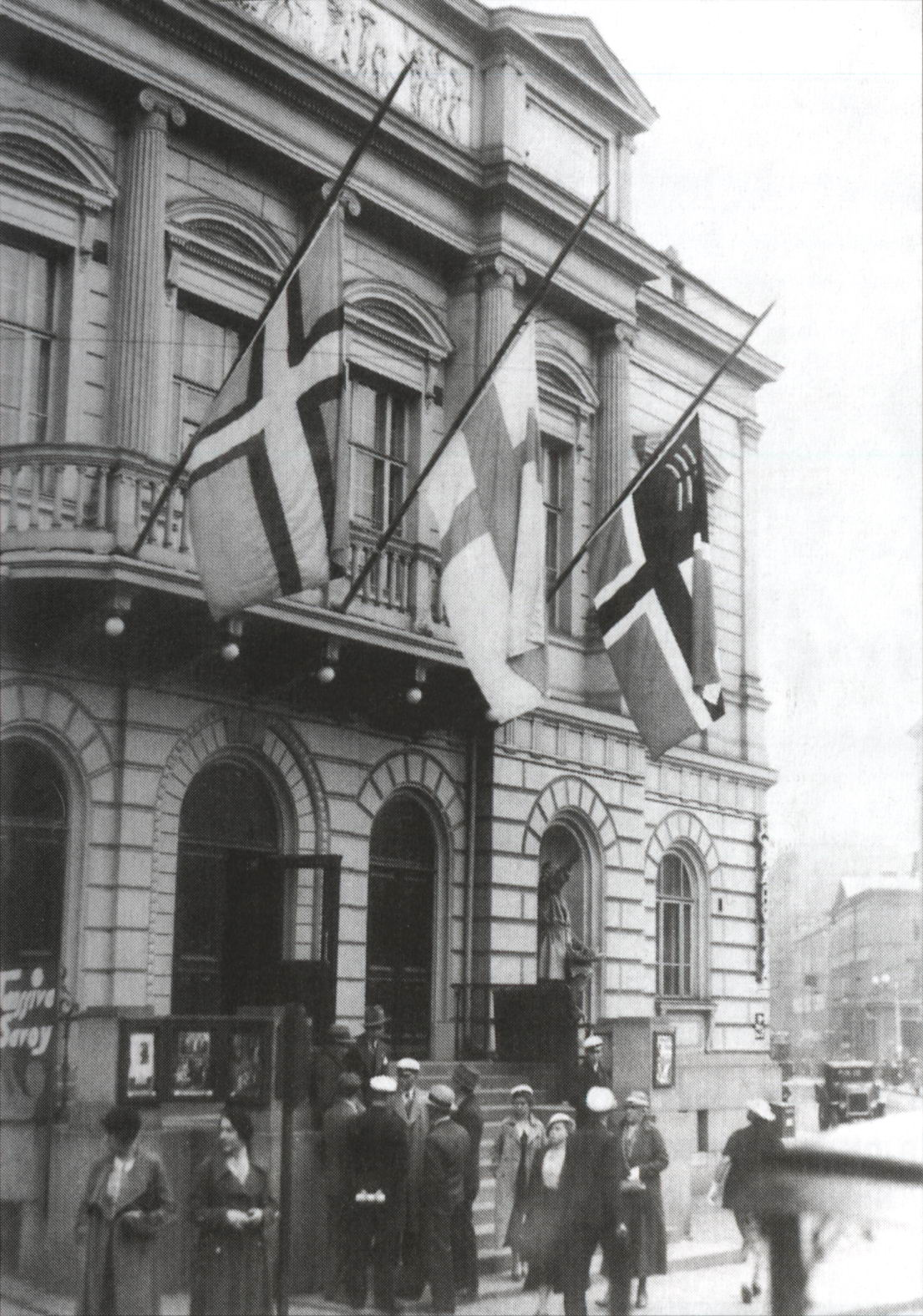 Полуспущенные флаги Ингерманландии, Финляндии и Восточной Карелии на фронтоне Старого студенческого дома в Хельсинки в знак протеста против депортаций из Ингерманландии и Восточной Карелии. Осень 1934 г.